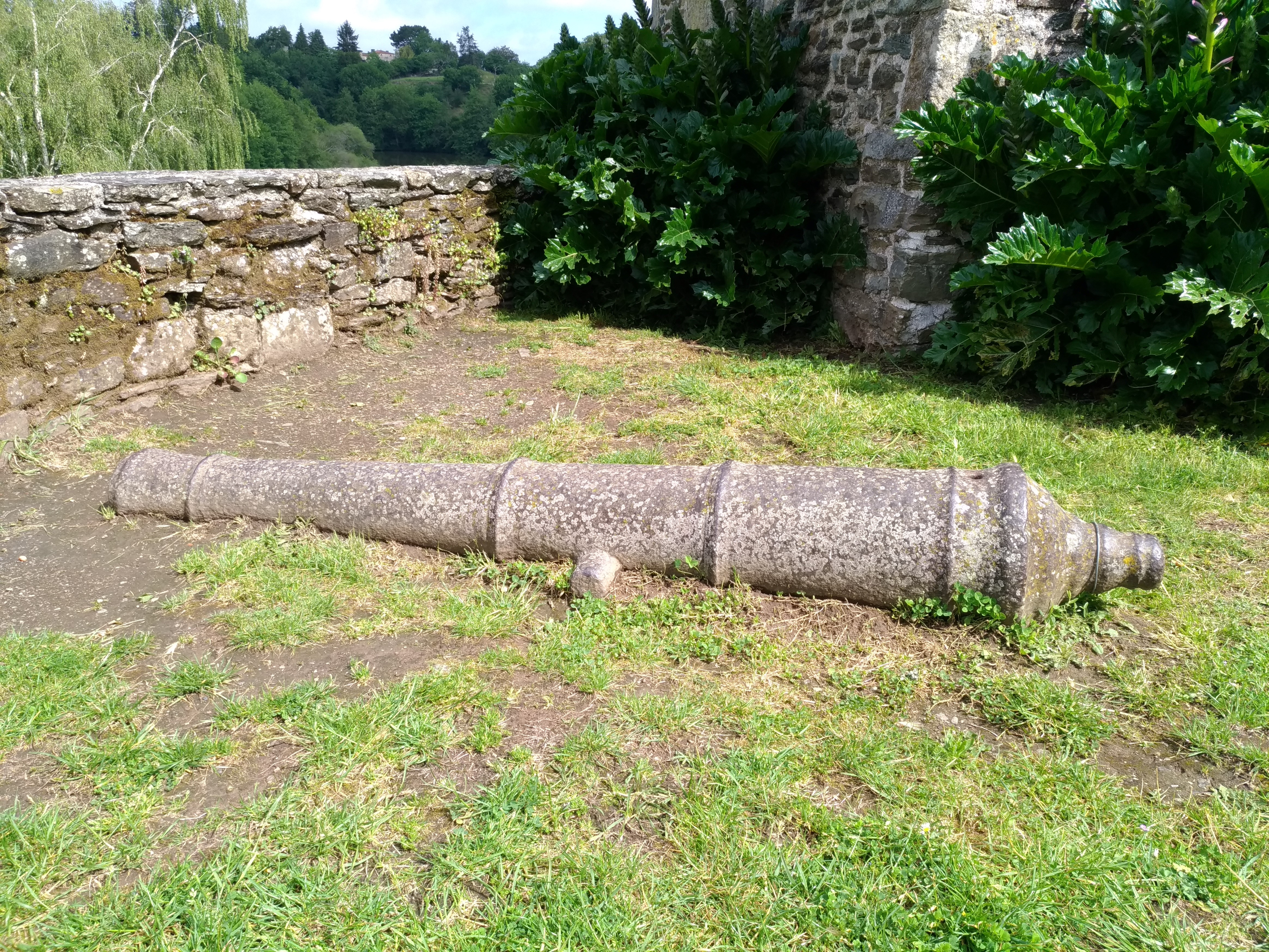 Canon retrouvé dans le puits de la place du Bail vers 1838. Il date probablement du siège de Vouvant par Arthur de Richemont contre Jean II de Parthenay-l'Archevêque. Ce canon est situé au sommet de la Porte Saint-Louis, dans le jardin public.